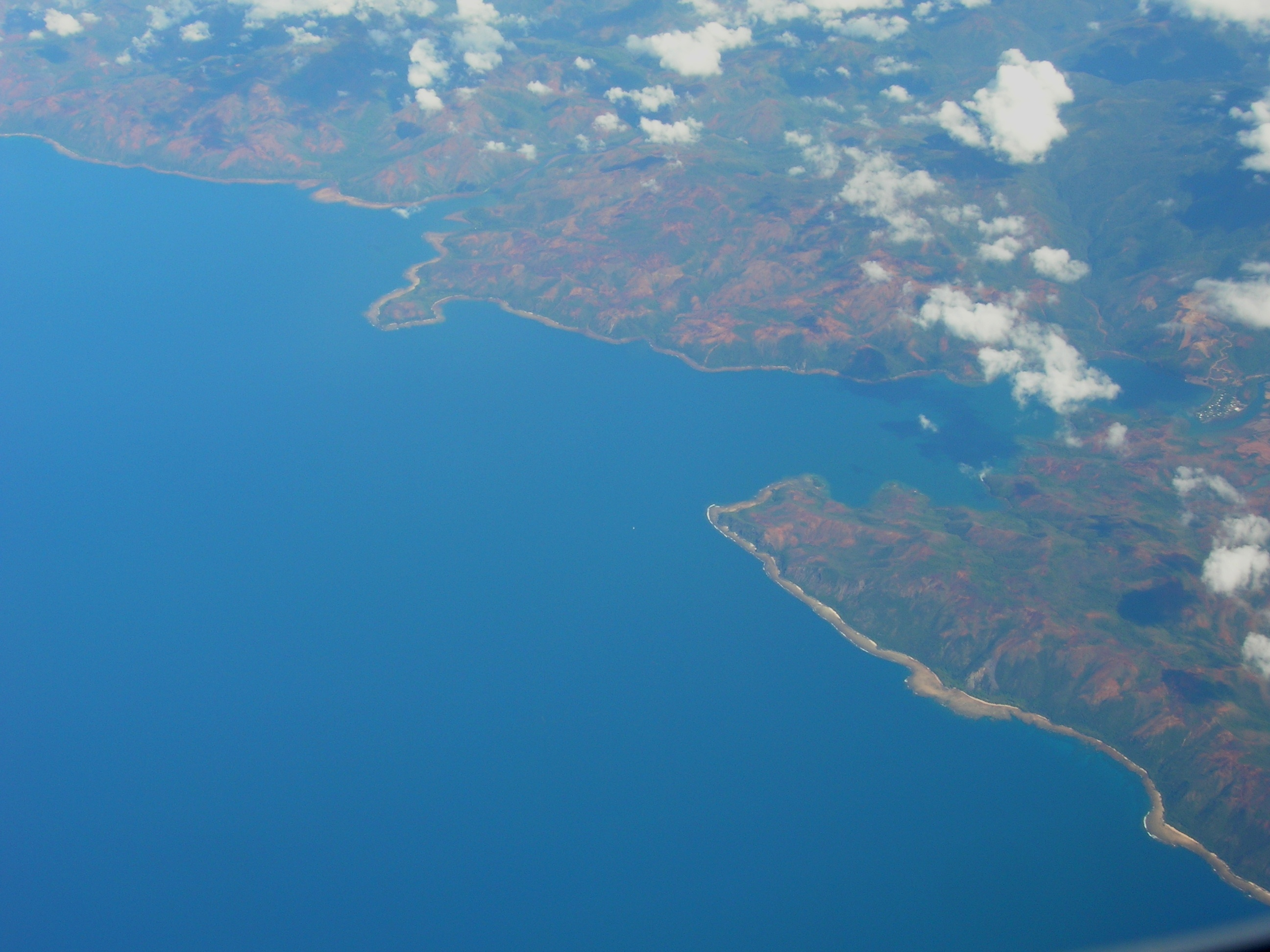 i090806 044